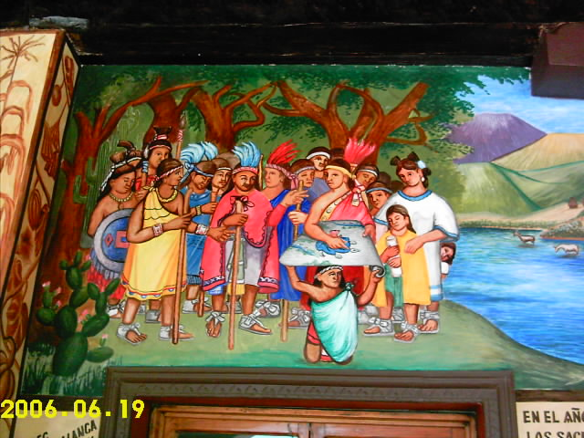 En esta pintura, se ilustra la fundación de la Ciudad de Santa Ana Chiautempan, en el año de 1380, esta pintura (mejor dicho mural), fue realizada por el maestro Magdaleno Melendez Bello durante los meses de Noviembre a Febrero de 2005 a 2006 en los portales de la Presidencia Municipal de Chiautempan